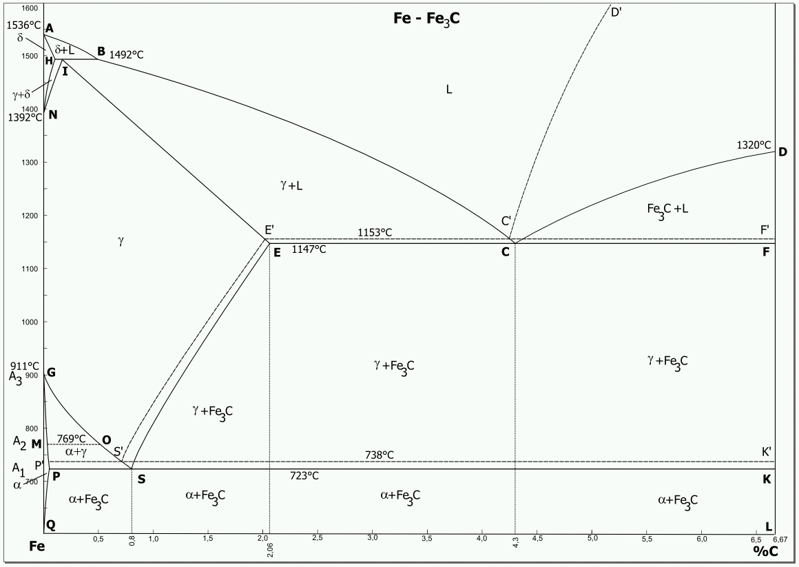 Eisen-Kohlenstoff-Diagramm stabil und metastabil mit Phasenbeschriftung